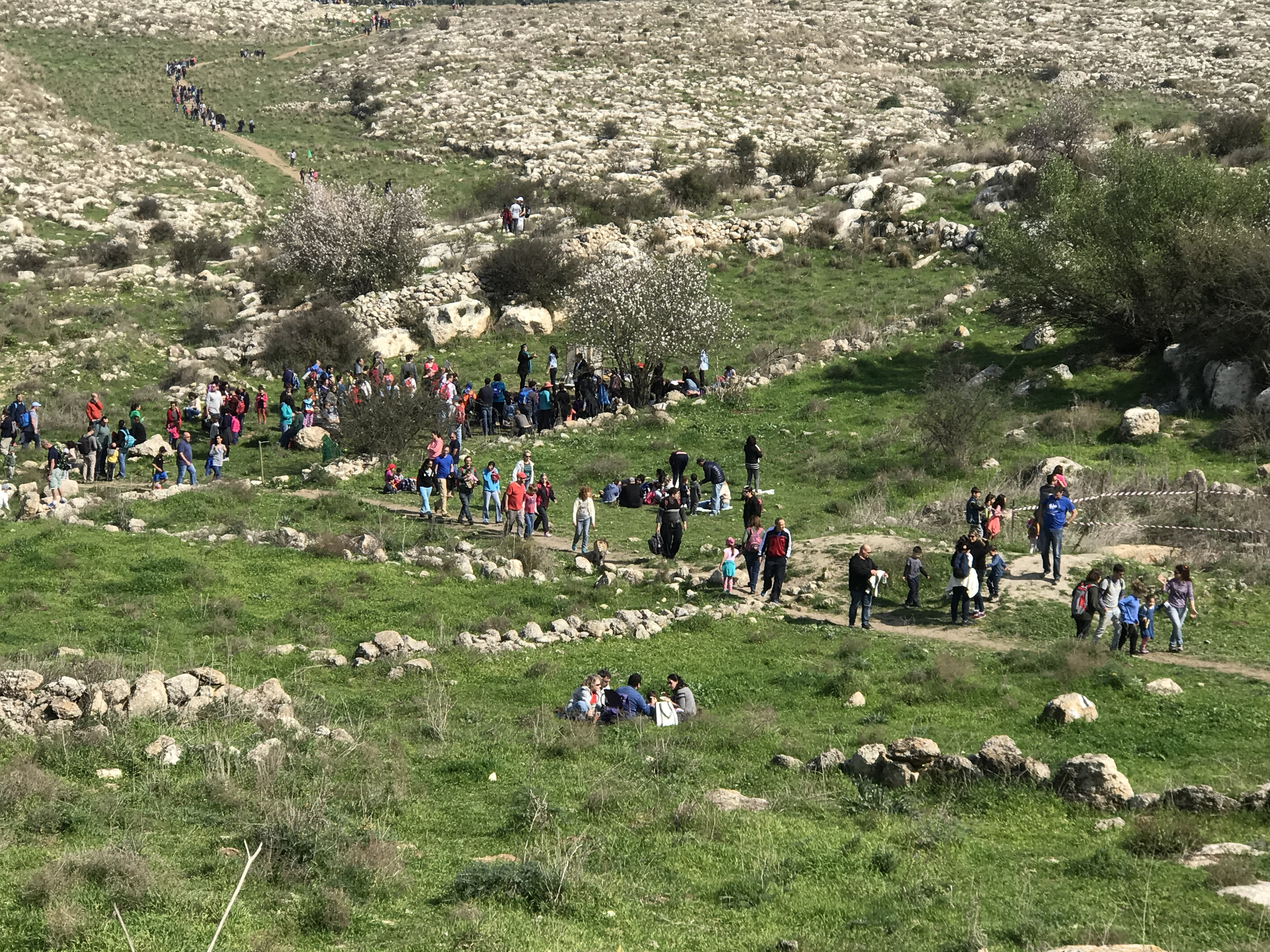 אירוע גבעות דרומיות של החברה להגנת הטבע במודיעין 2018